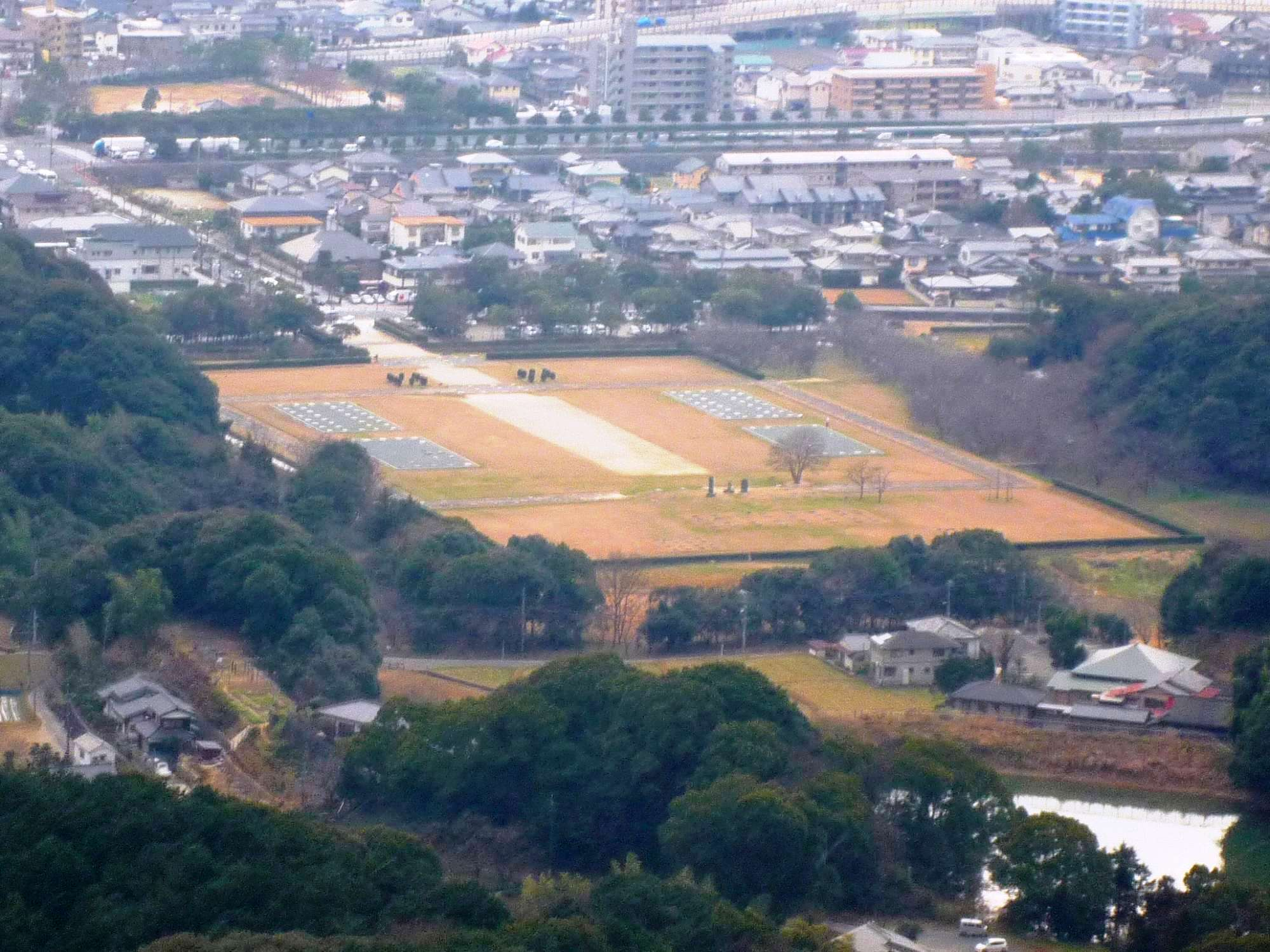 大宰府政庁跡（北へ約3kmの岩屋山から撮影）